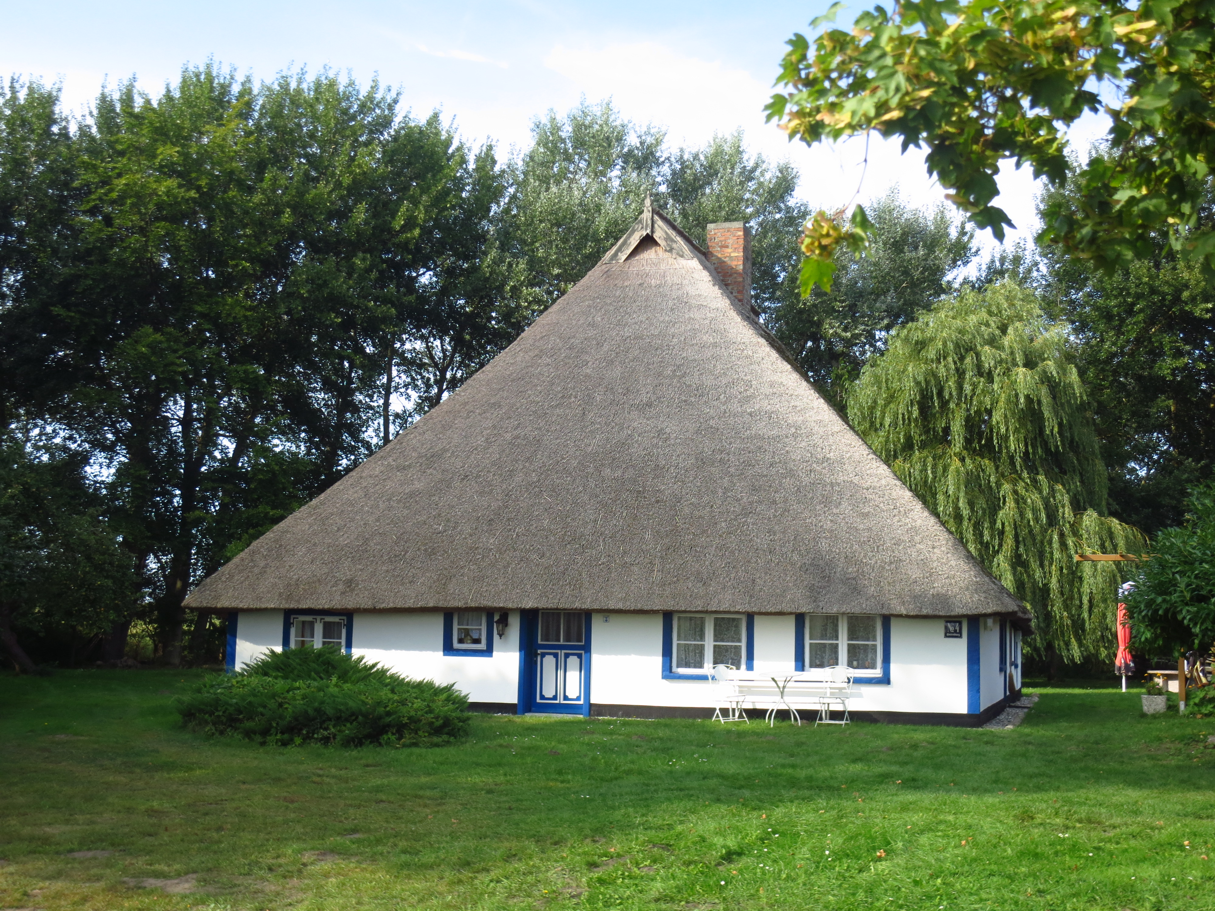 Freesenort, Insel Ummanz, denkmalgeschütztes Wohnhaus Freesenort 4